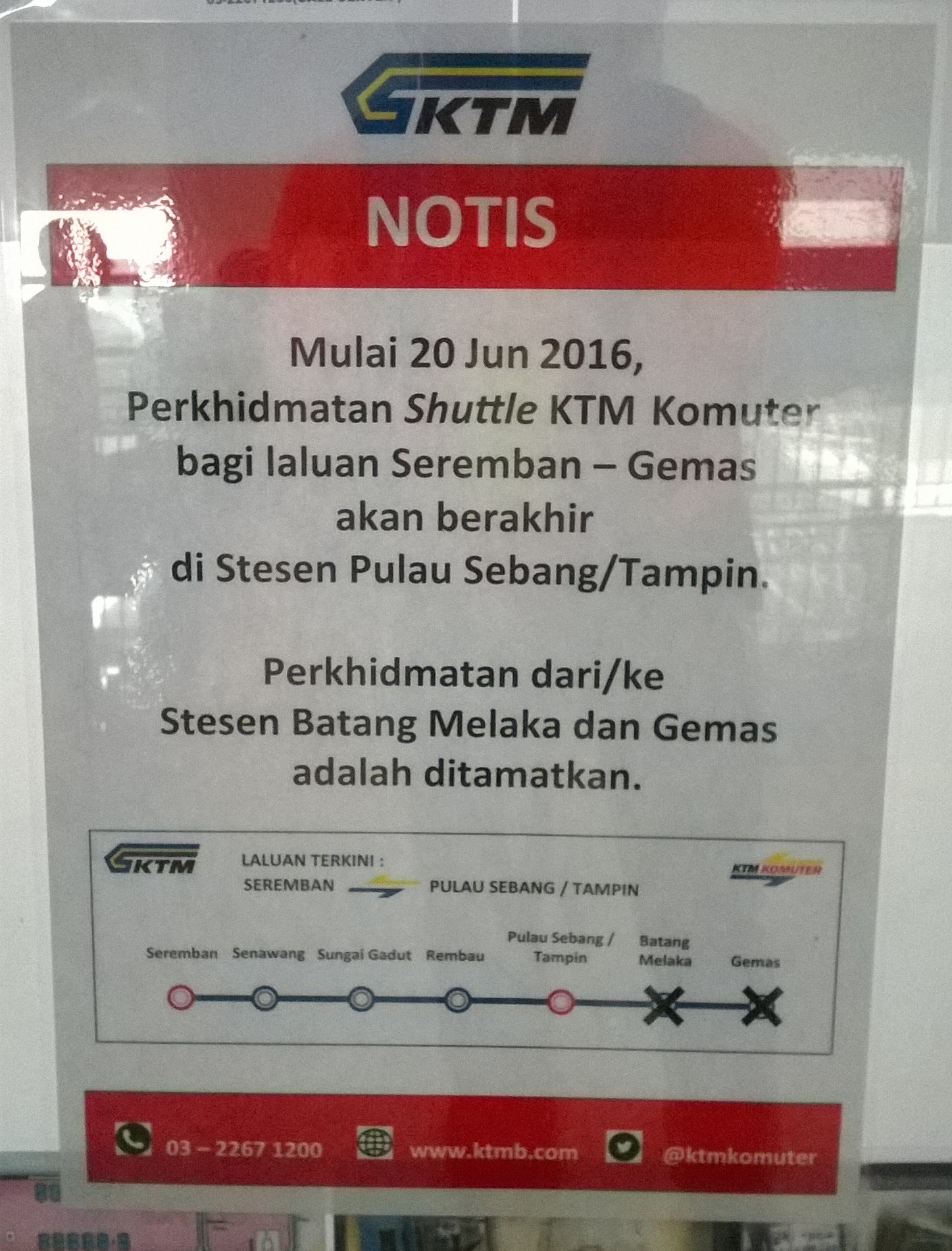 Notis penutupan perkhidmatan Shuttle KTM Komuter dari/ke stesen keretapi Batang Melaka dan Gemas. gamber ditangkap di stesen keretapi KTM Pulau Sebang (Tampin)